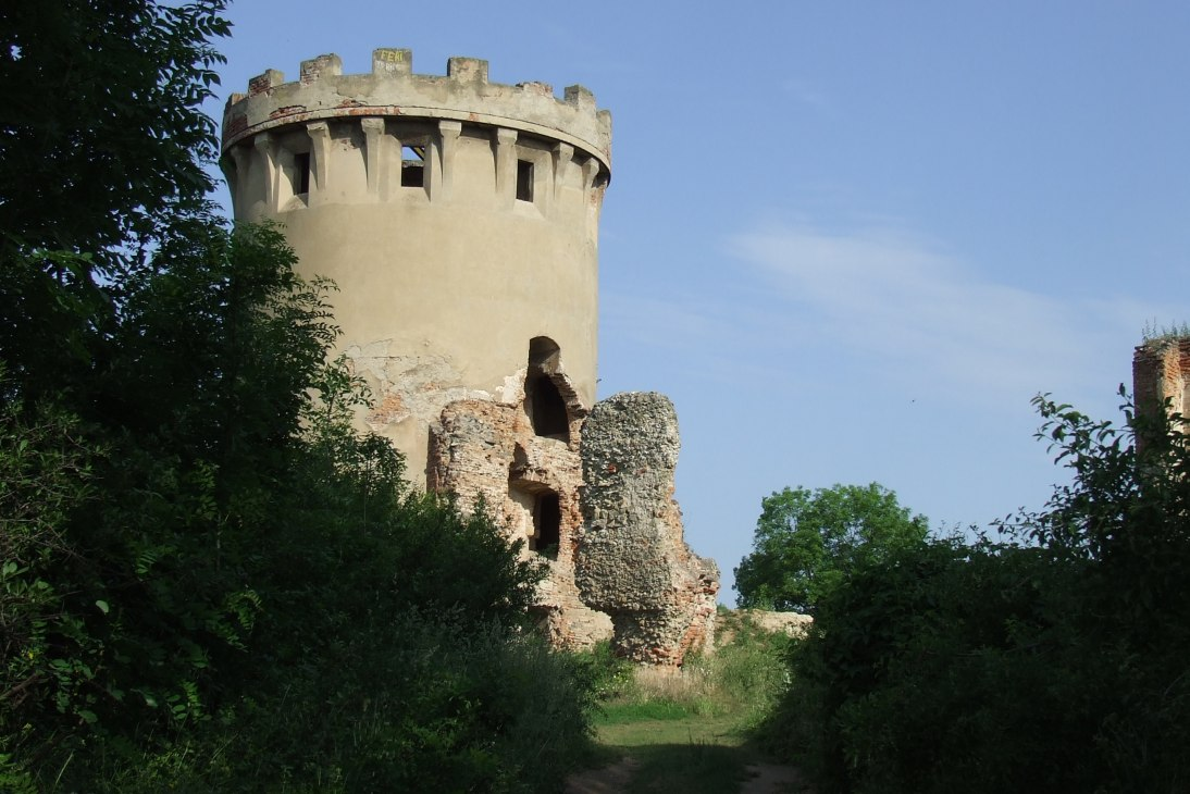 Ardud citadel, Satu Mare County, Romania